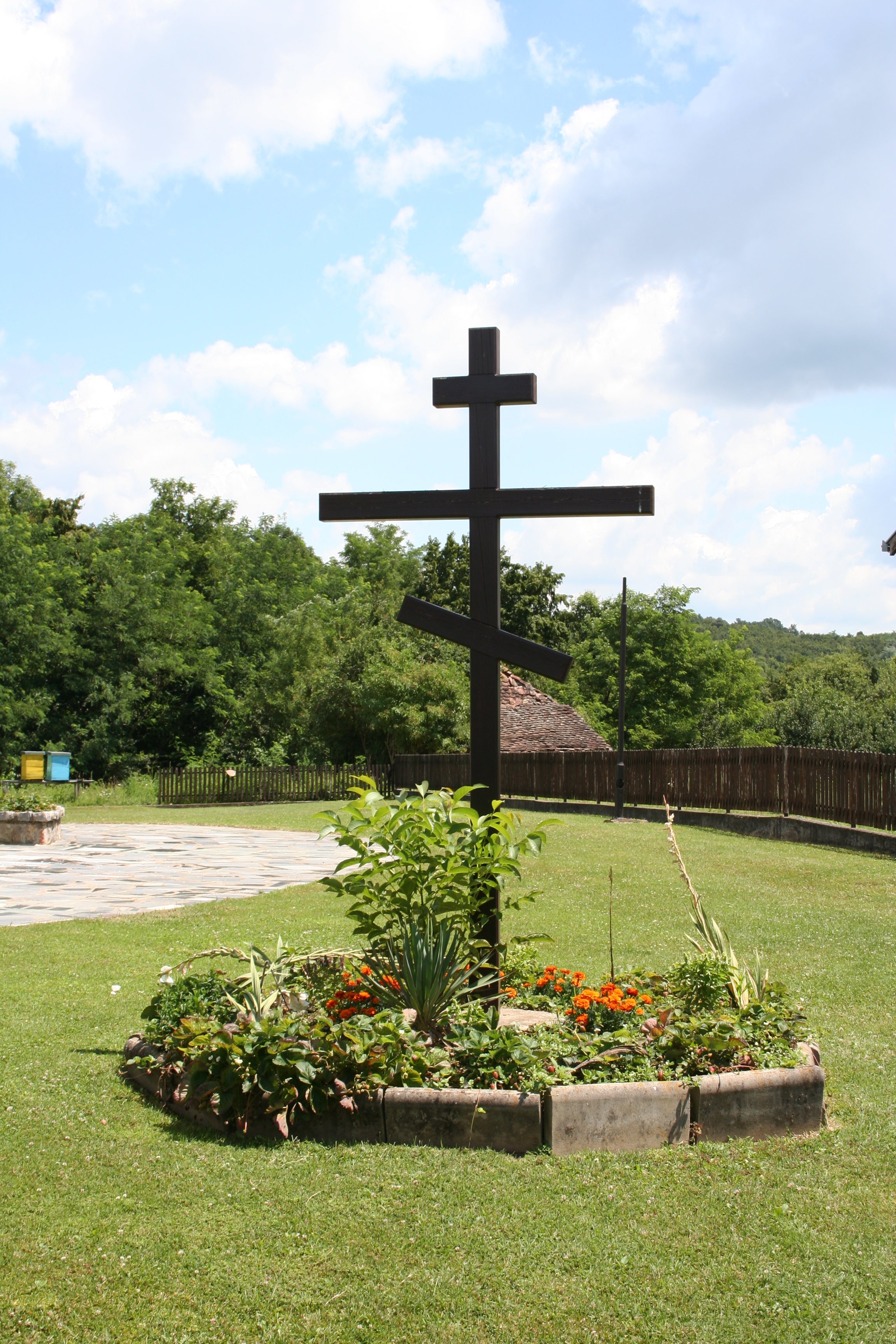 Crkva Sv. Georgija, Mojković